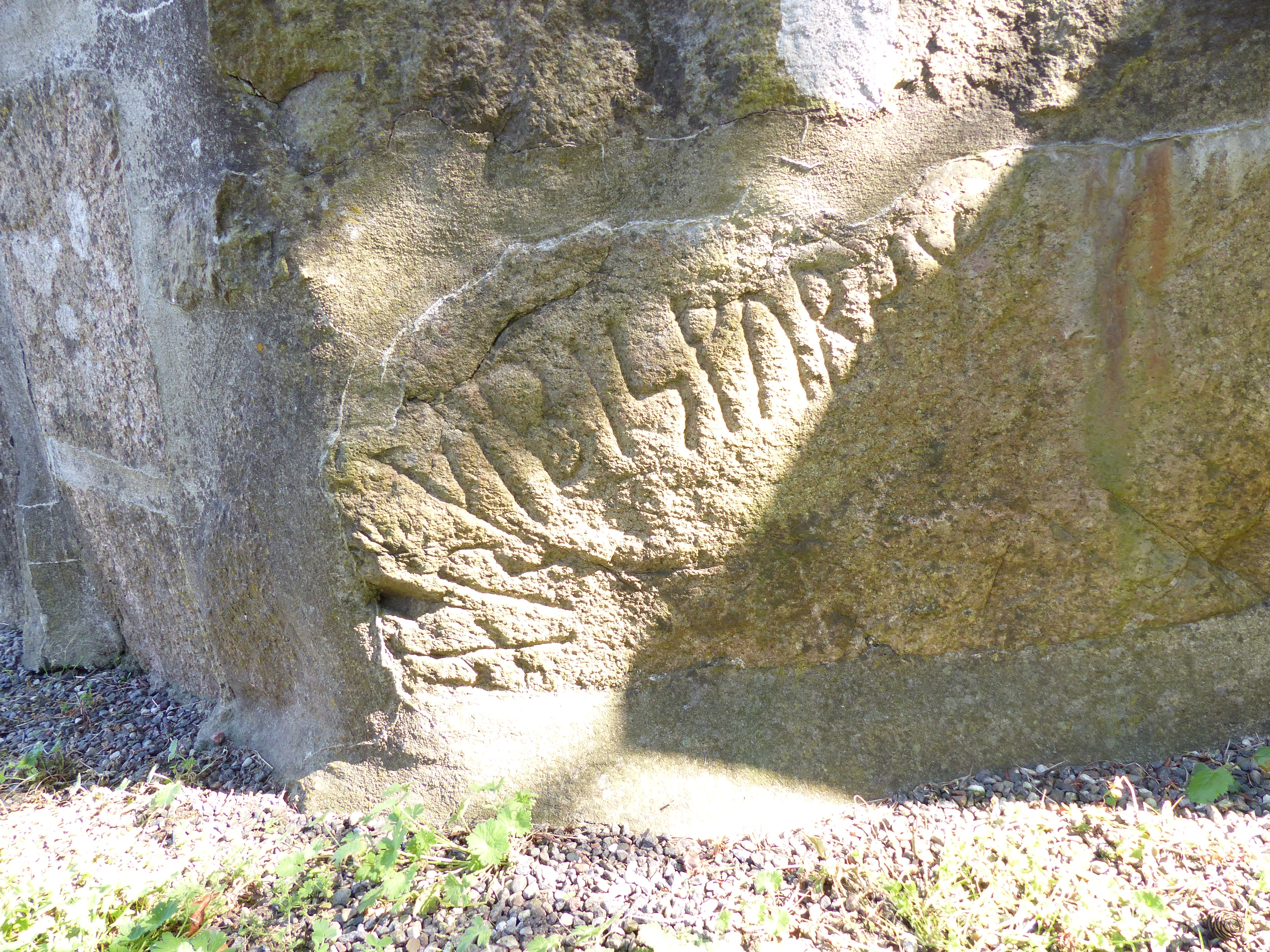 Klemensker, Klemensker Kirkegaard, Ærkebiskoppens sten (Klemensker-sten 7)